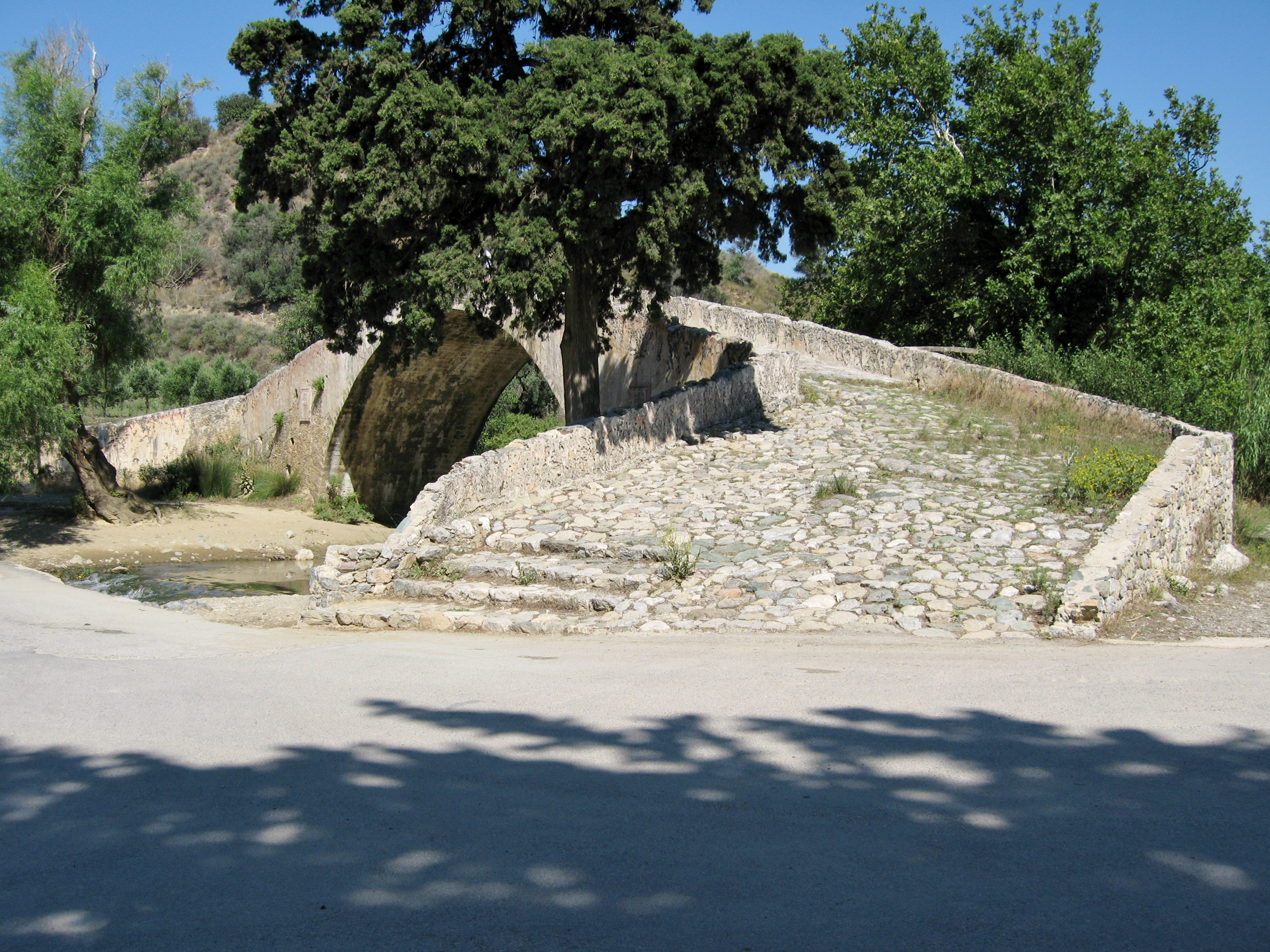 Große Brücke (μεγάλη γέφυρα) über den Megalopotamos, erbaut 1850 bis 1852, Gemeinde Agios Vasilios, Regionalbezirk Rethymno, Kreta, Griechenland